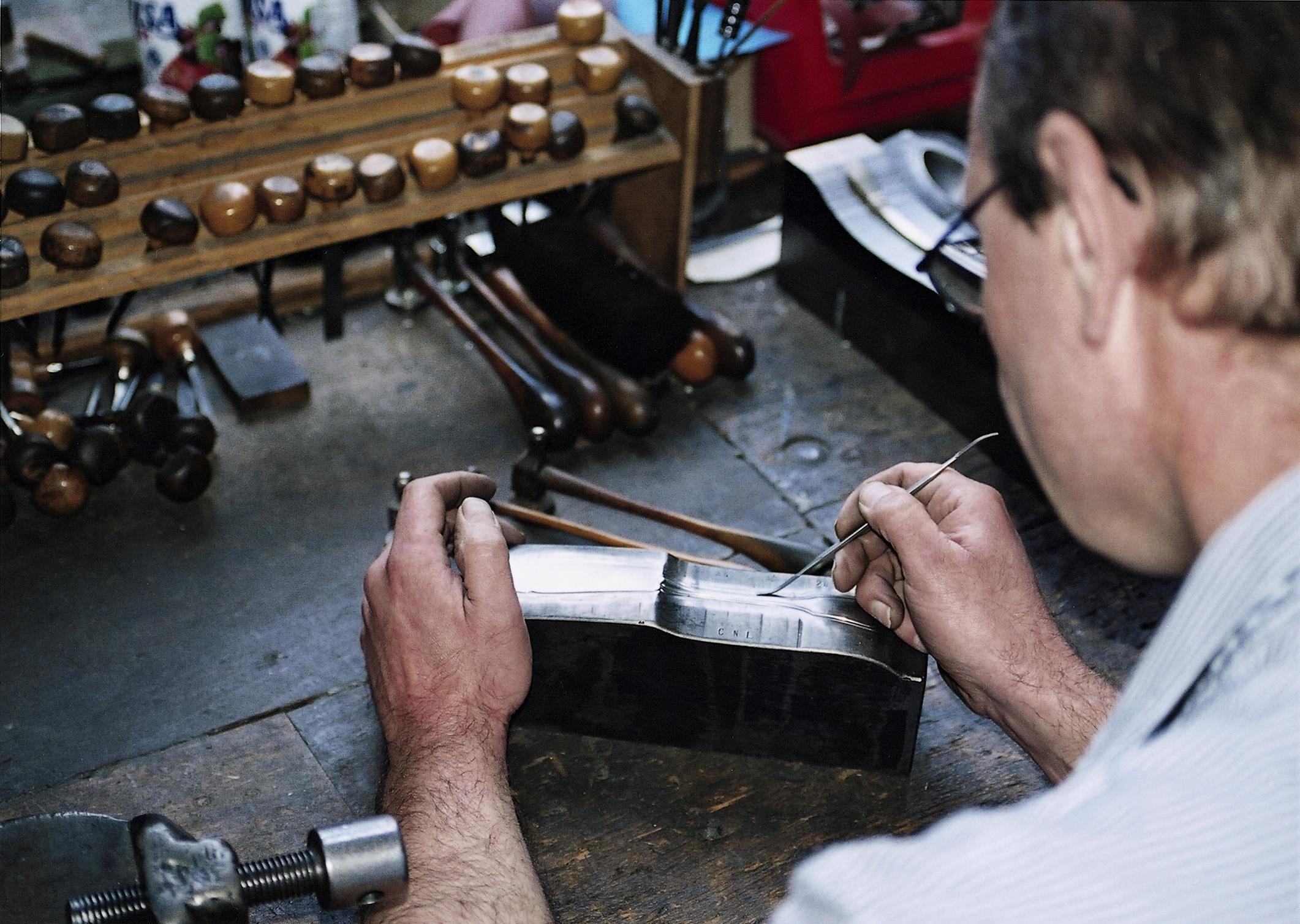 Bearbeitung eines Werkzeuges